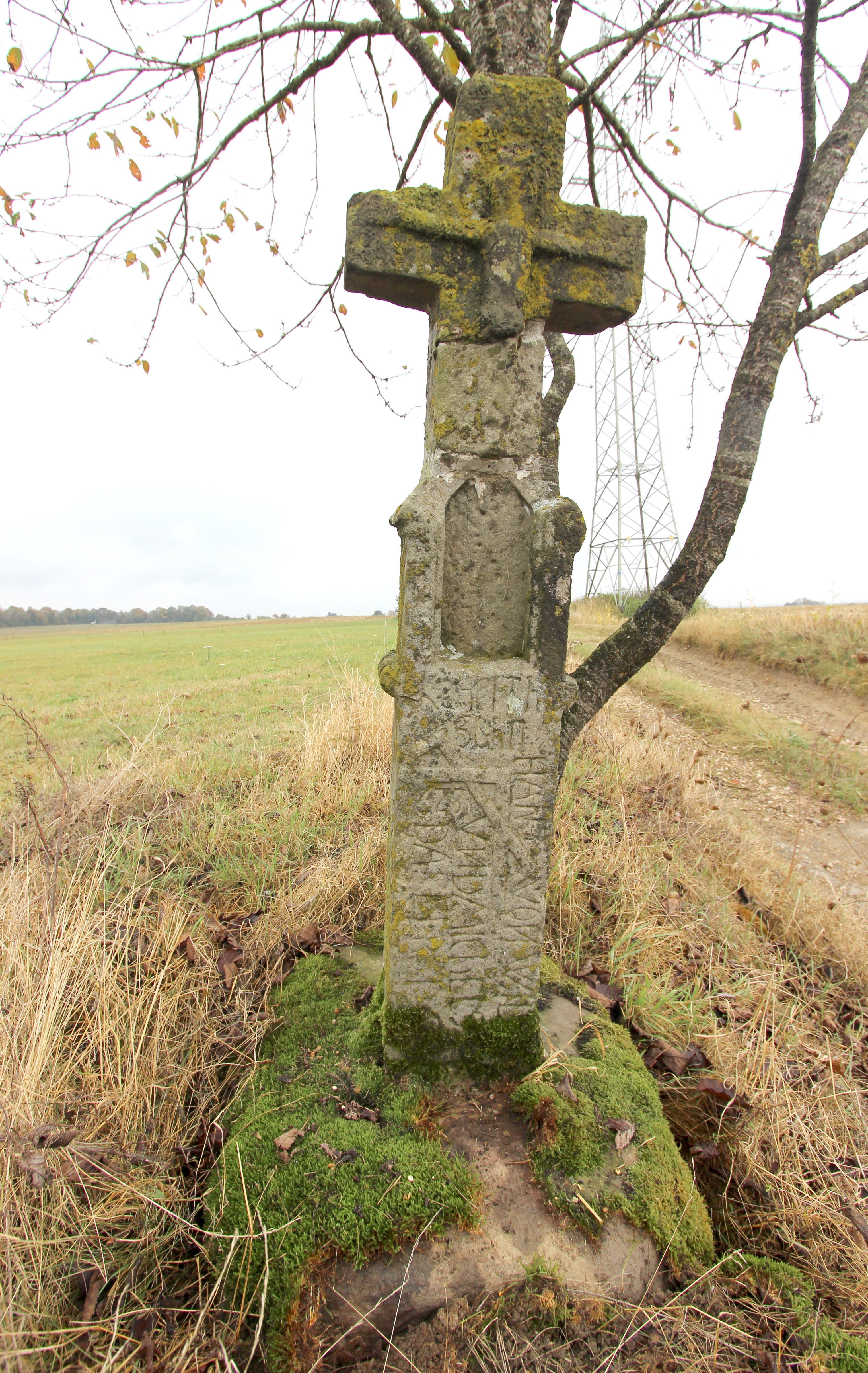 54655 Wilsecker, östlich des Ortes an der L 24 bei Wilsecker. Wegekreuz von 1623. Unvollständig erhaltene Inschrift, eindeutig lesbar nur der Name HANZ VON WILTSAECKER (die letzten fünf Buchstaben fehlen); zwischen den Schriftzeilen Symbole des Zimmerhandwerks (Klammer und Winkel). Aufnahme von 2017.